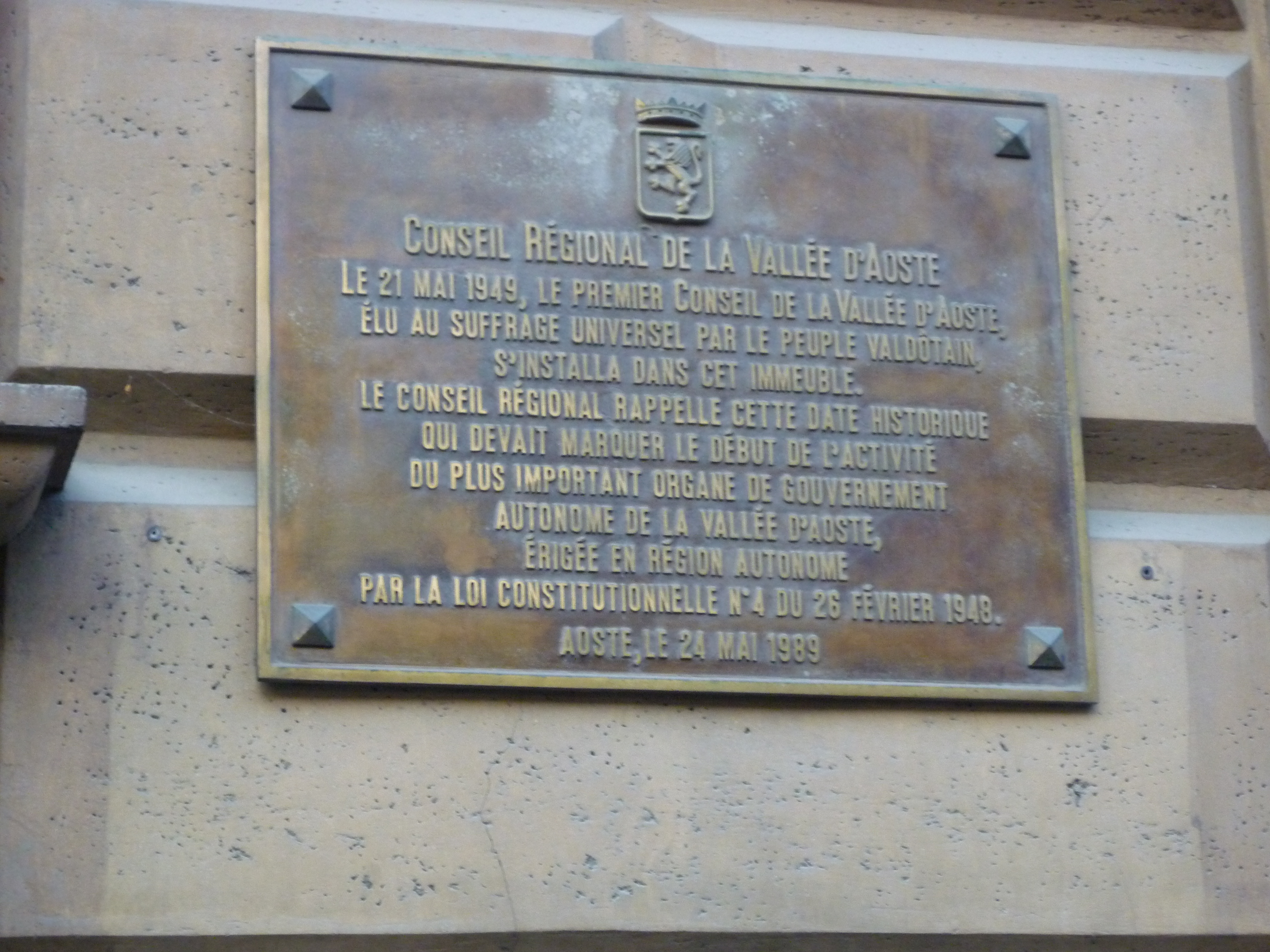 Plaque en souvenir du premier siège du conseil régional de la Vallée d'Aoste (Italie)